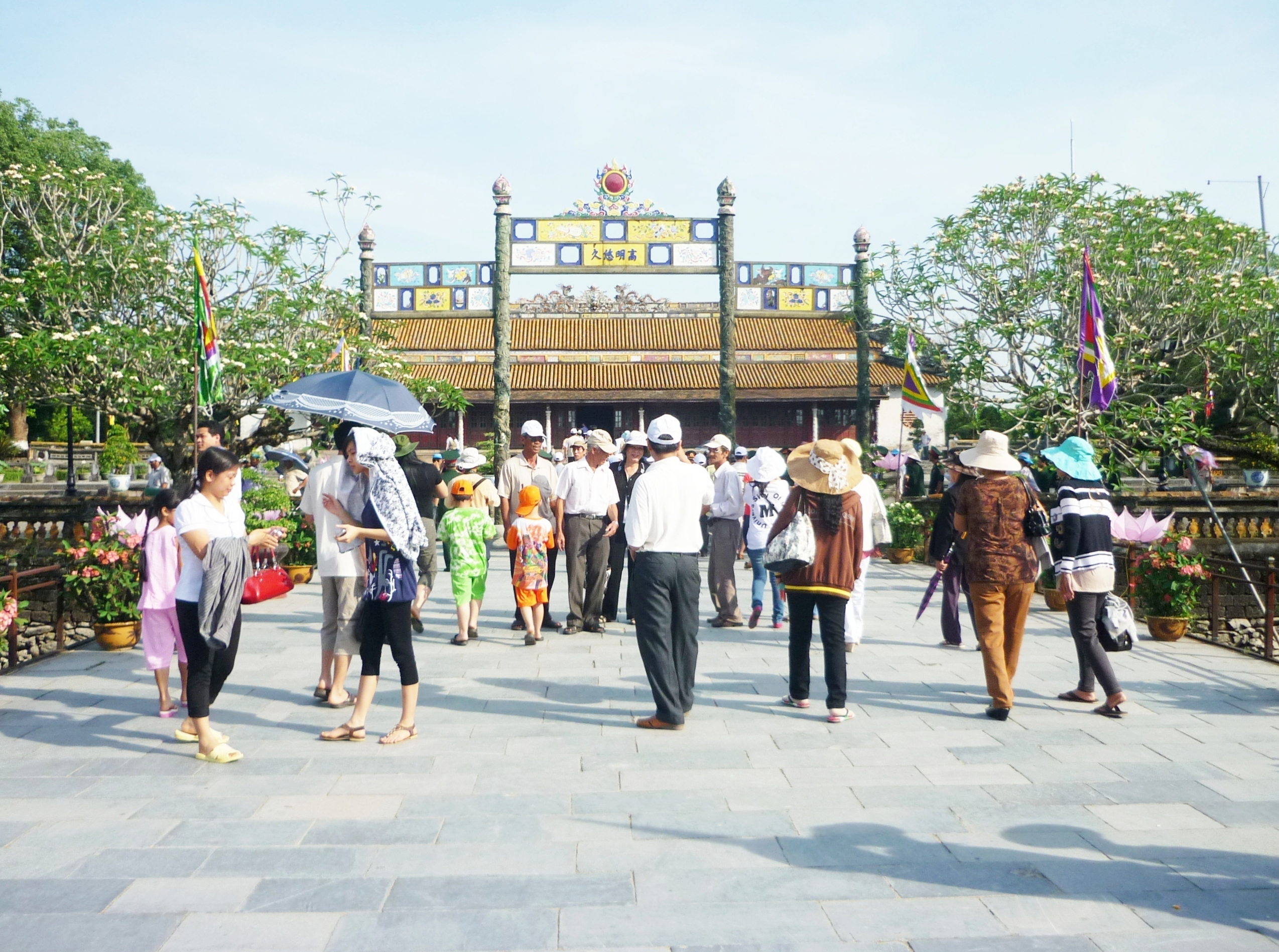 Thể loại:Huế Thể loại:Du lịch Huế Thể Loại:Di tích cố đô Huế